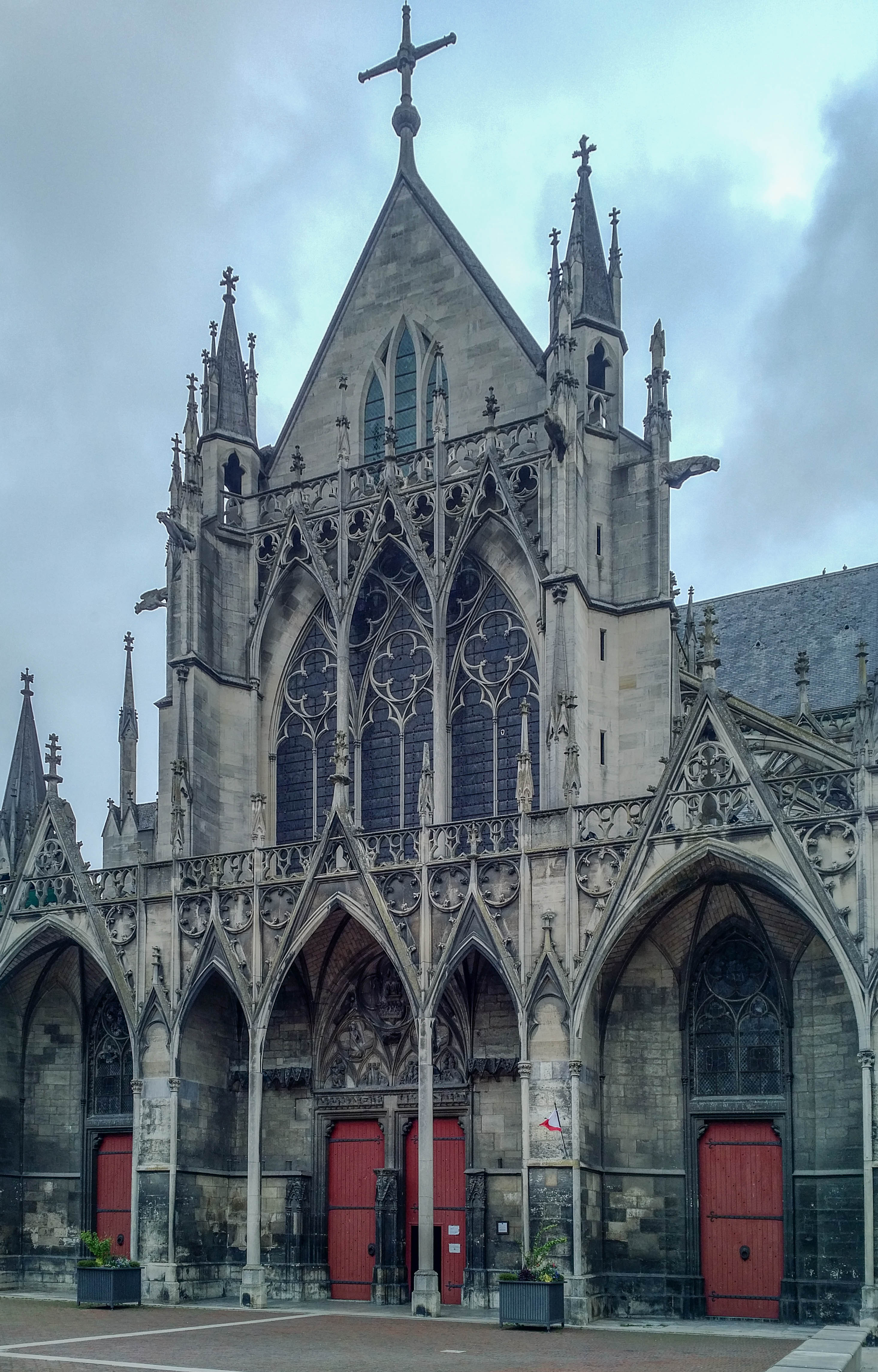 Façade de la basilique Saint-Urbain, à Troyes (construite de 1262 à 1286, sur l'ordre du pape Urbain IV, qui était originaire de cette ville).